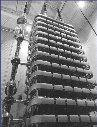 Thyristorturm in der schwedischen Umrichterhalle der Baltic Cable AB, Höhe 16,8 Meter [1]